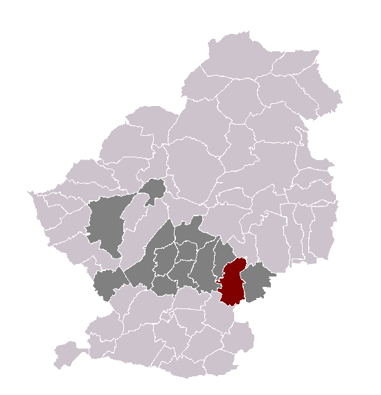 Auberchicourt dans son canton et son arrondissement